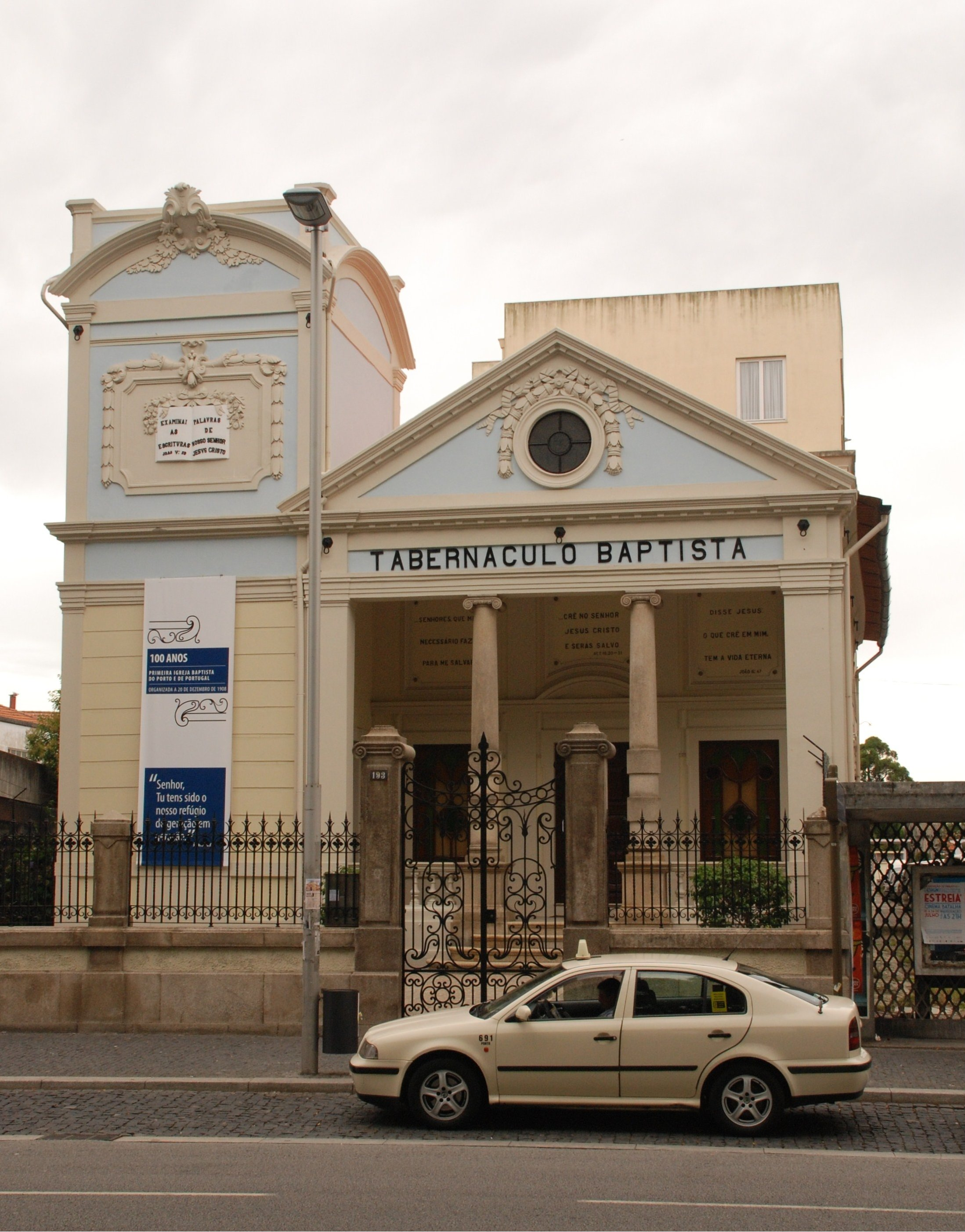 Tabernáculo Baptista / Igreja Baptista do Porto, Preaça Mousinho da Silveira (Rotunda da Boavista), freguesia de Massarelos, Porto, Portugal